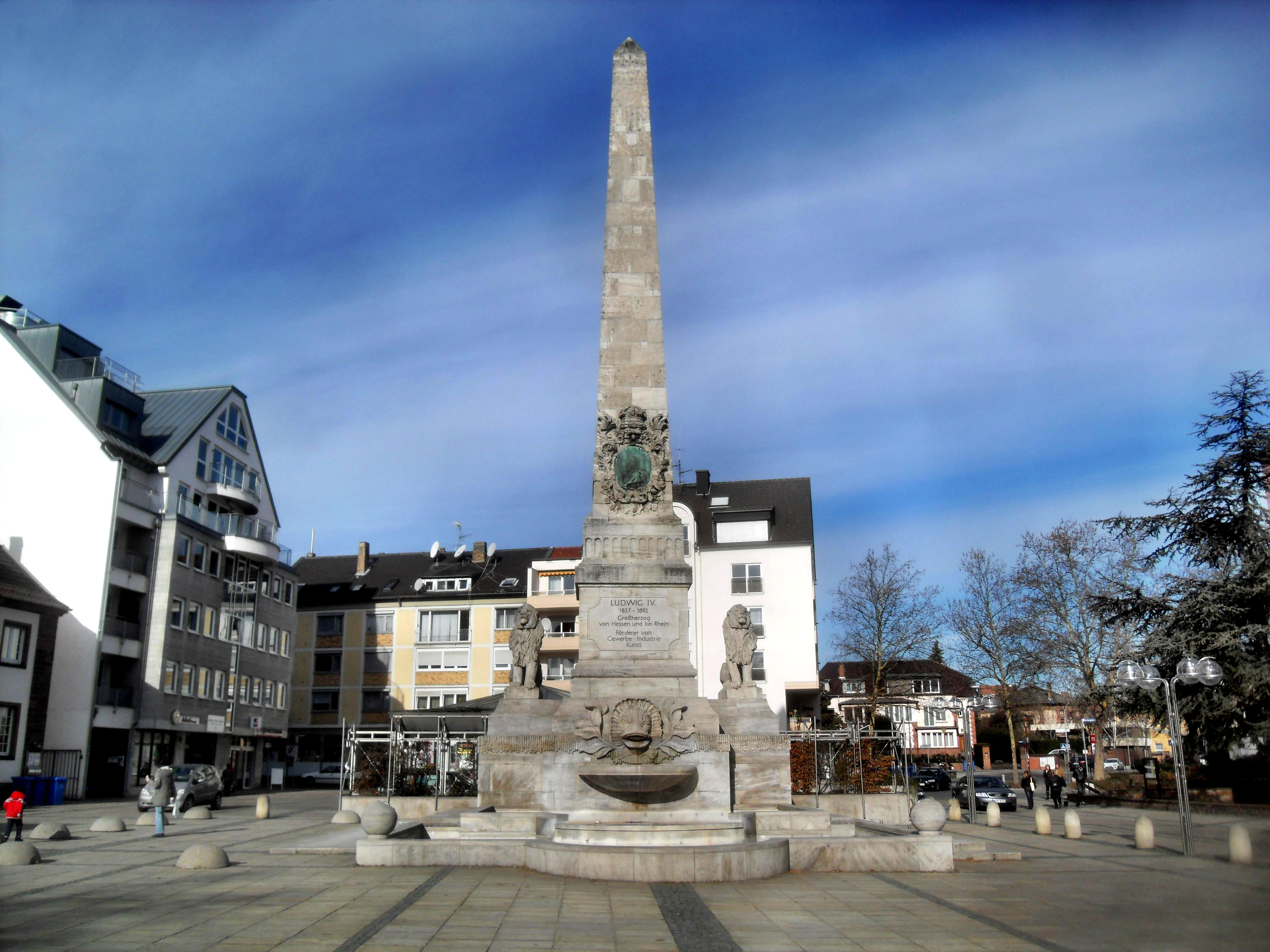 Das Ludwigsdenkmal in Worms in Rheinland-Pfalz (Deutschland) vom Ludwigsplatz aus